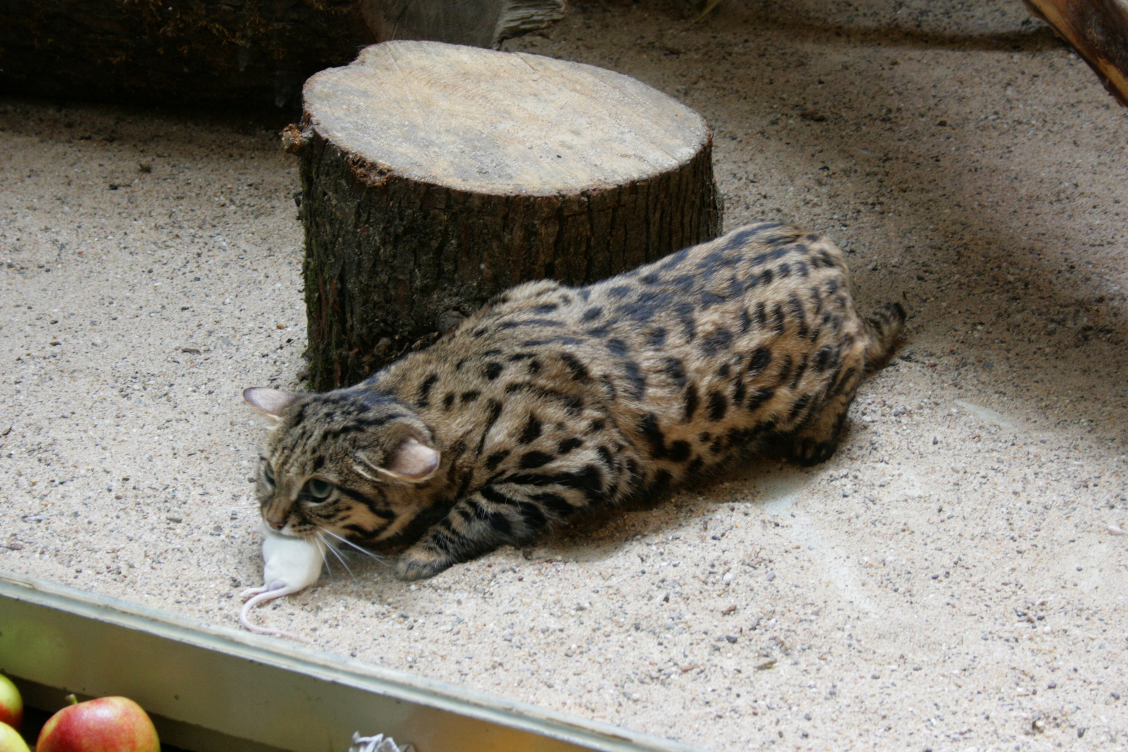 Felis nigripes im Zoo Wuppertal